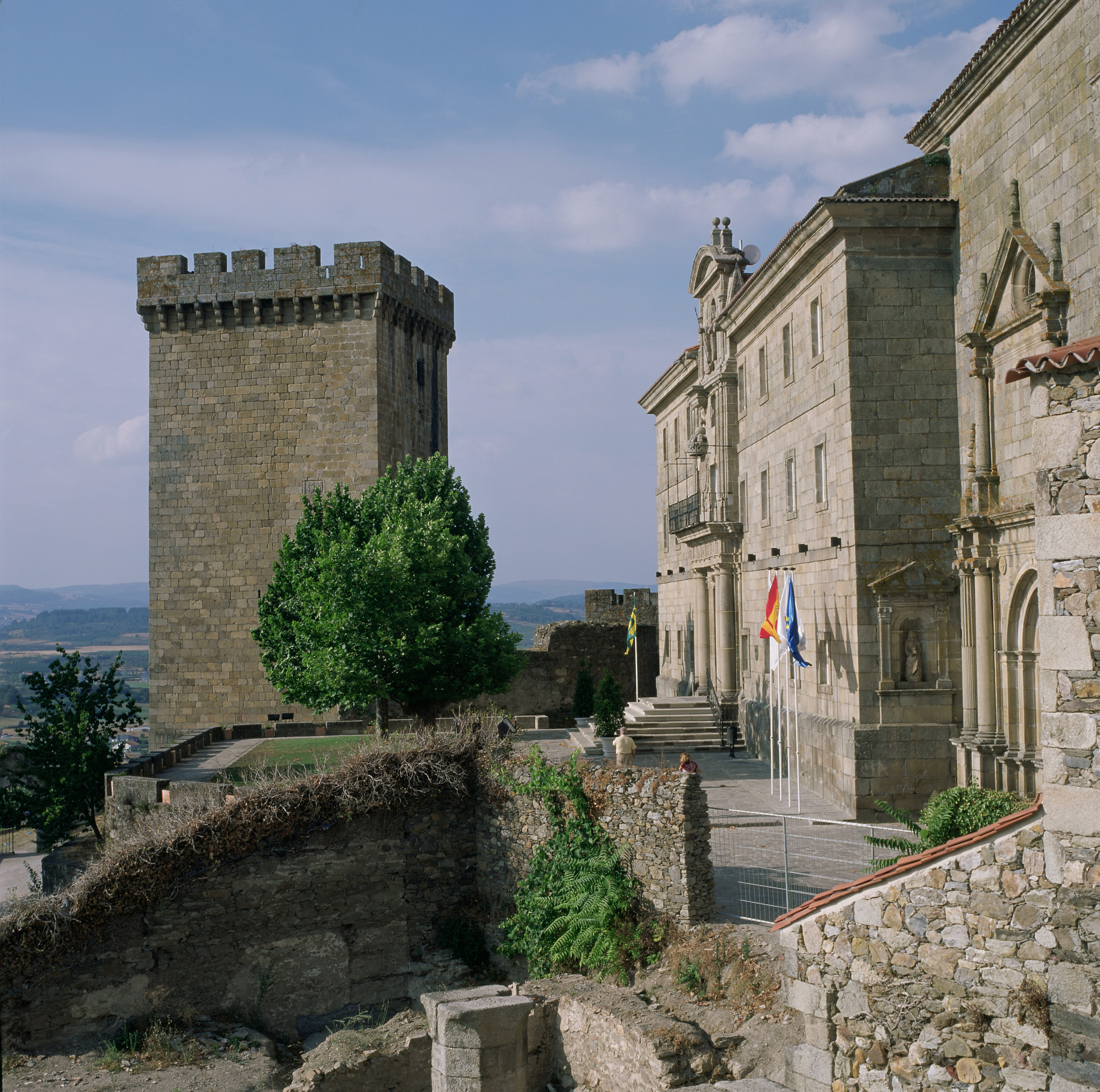 Parador de Monforte